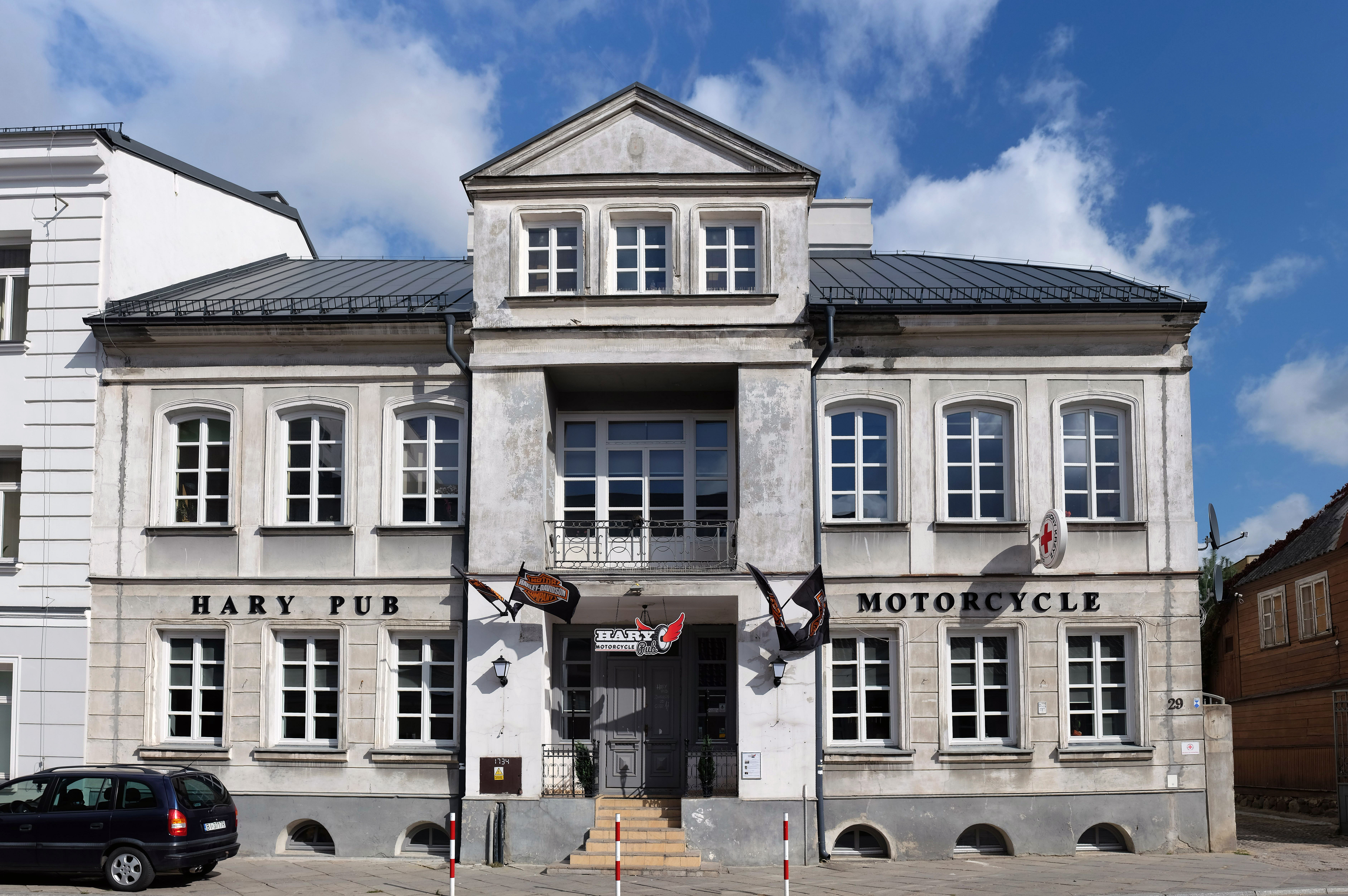 Białystok, kamienica, 1890